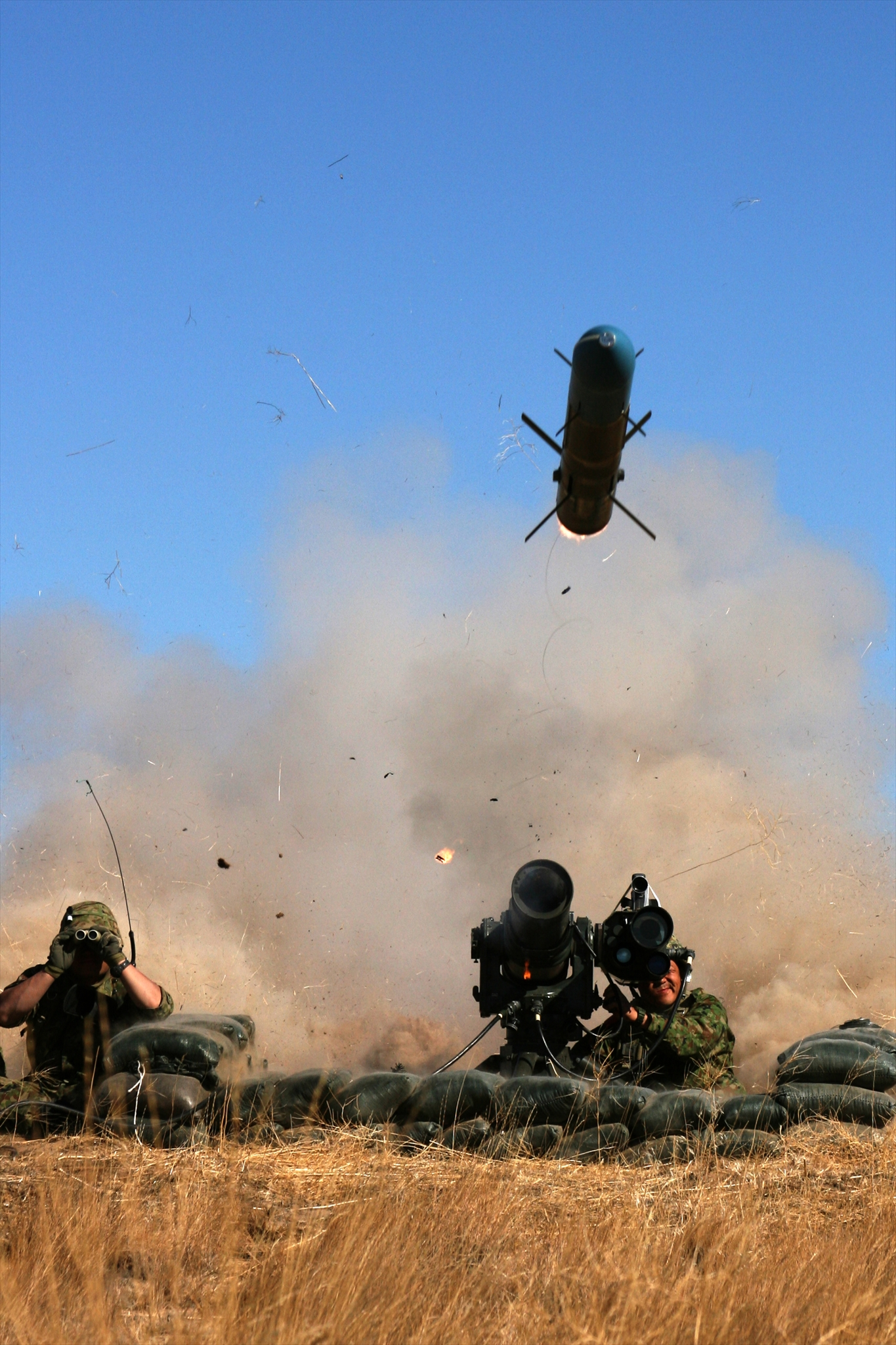 「重MAT発射の瞬間」 ７９式対舟艇対戦車誘導弾及び発射装置